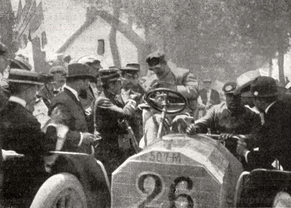 Le Comte Eliott Zborowsky, quatrième du Paris-Vienne 1902 sur Mercedes - Le Sport universel illustré du 6 juillet 1902, p.426